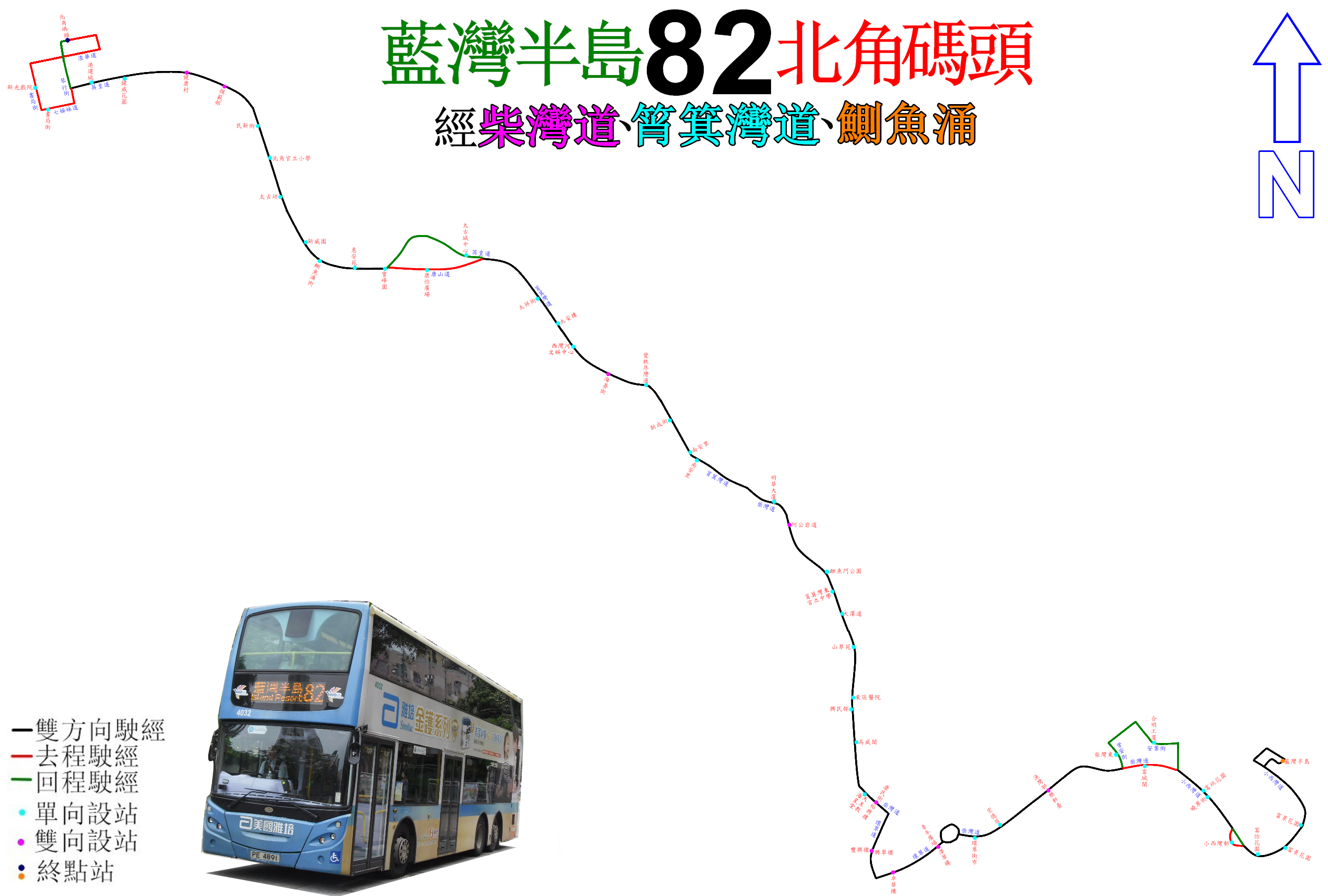 中文（香港）: 新巴82線的走線圖